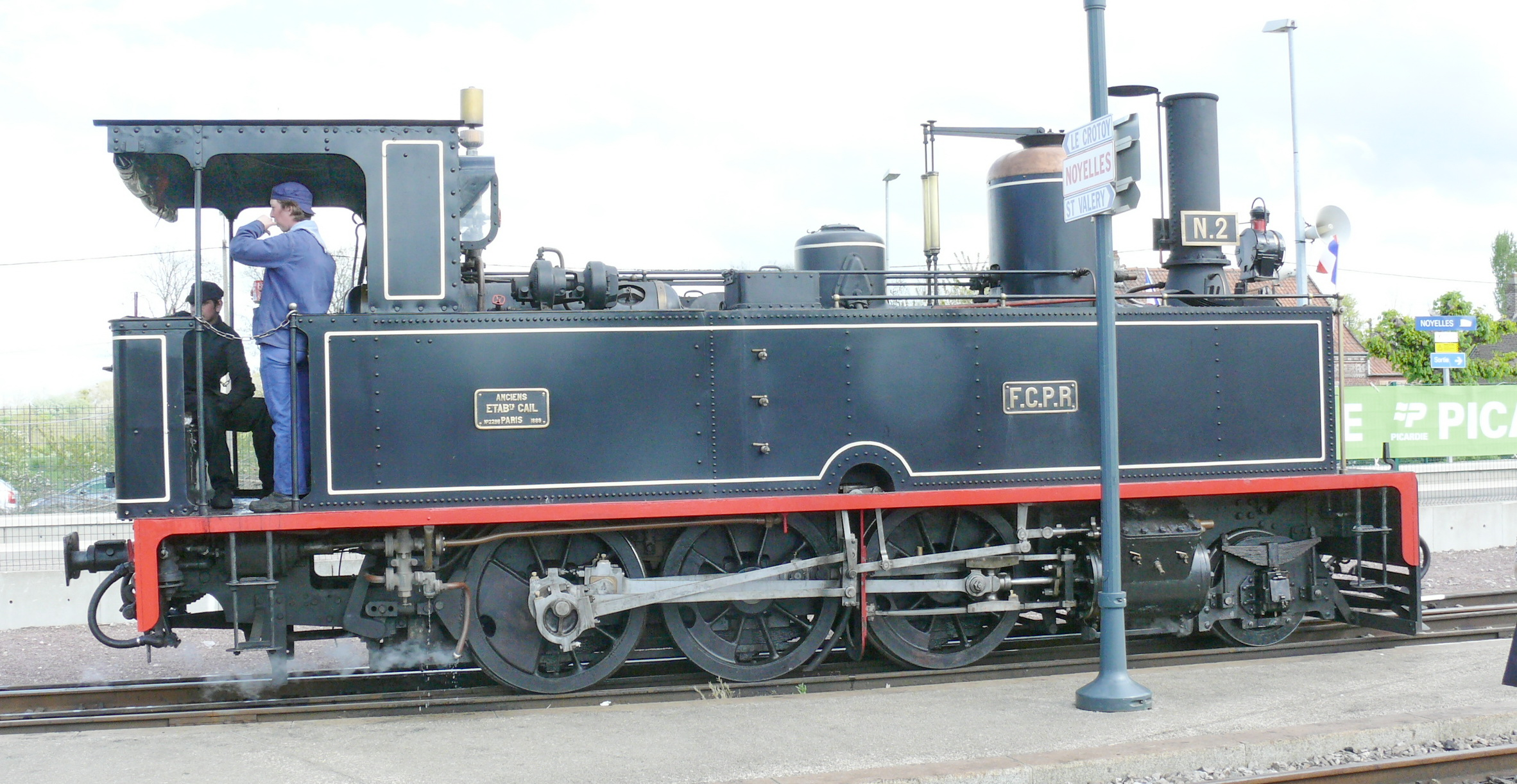 Locomotive à voie métrique 130T Cail N°2 de 1889, vue sur le Chemin de fer de la baie de Somme